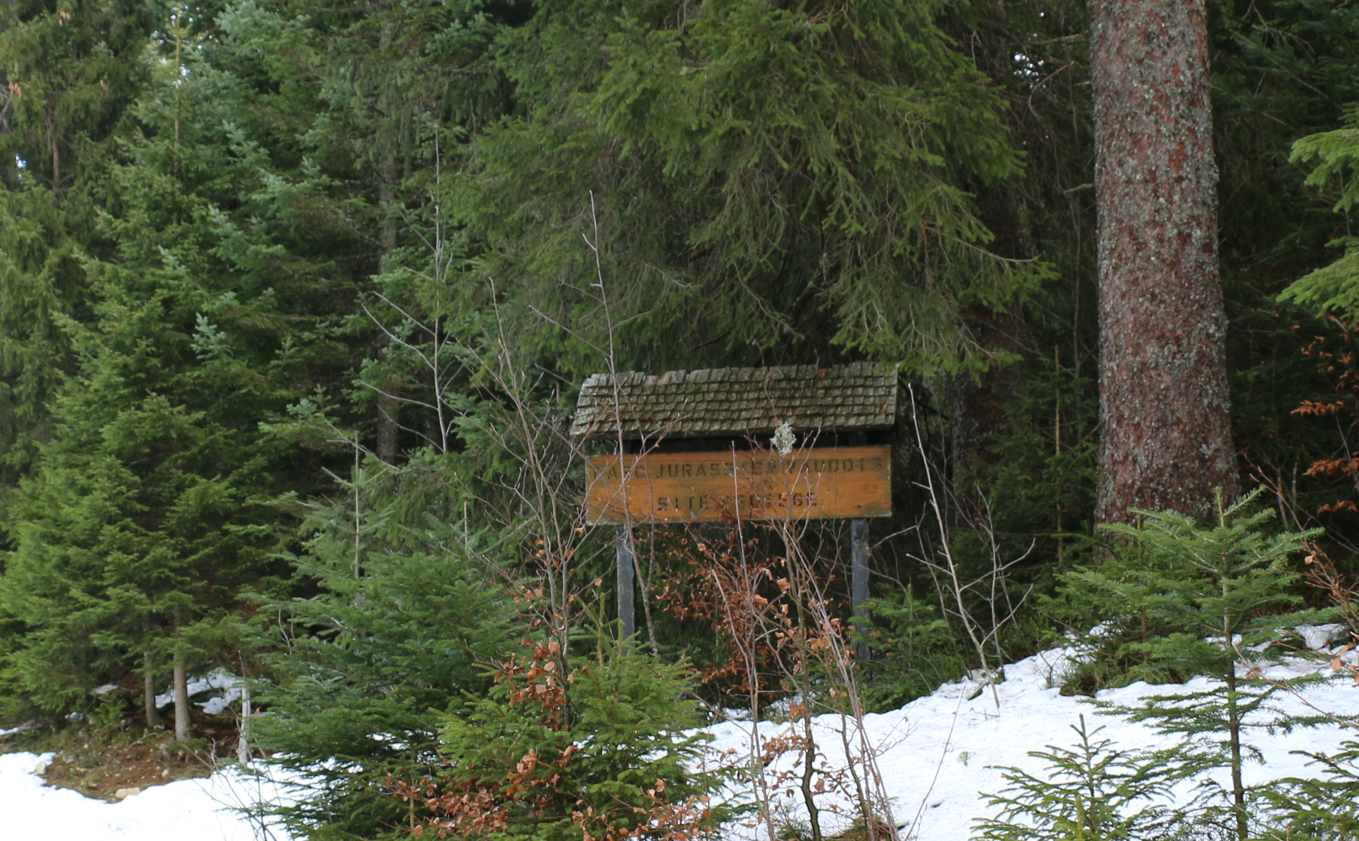 Parc Jurassien Vaudois, site protégé. Où est cet écriteau? (commune, lieu)